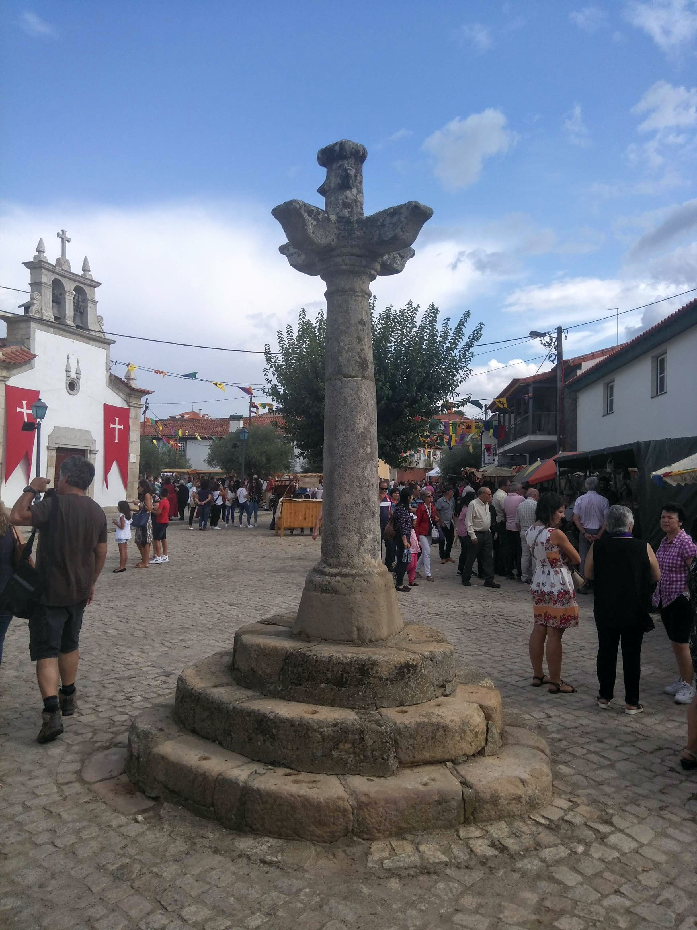 Pelourinho de Lamas de Orelhão - pelourinho em Mirandela, Portugal Cultural property Pelourinho de Lamas de Orelhão, Lamas de Orelhão, Mirandela, Bragança District, Portugal Q10348122, SIPA ID: 825, DGPC ID: 72864 Wiki Loves Monuments ID: DGPC-72864